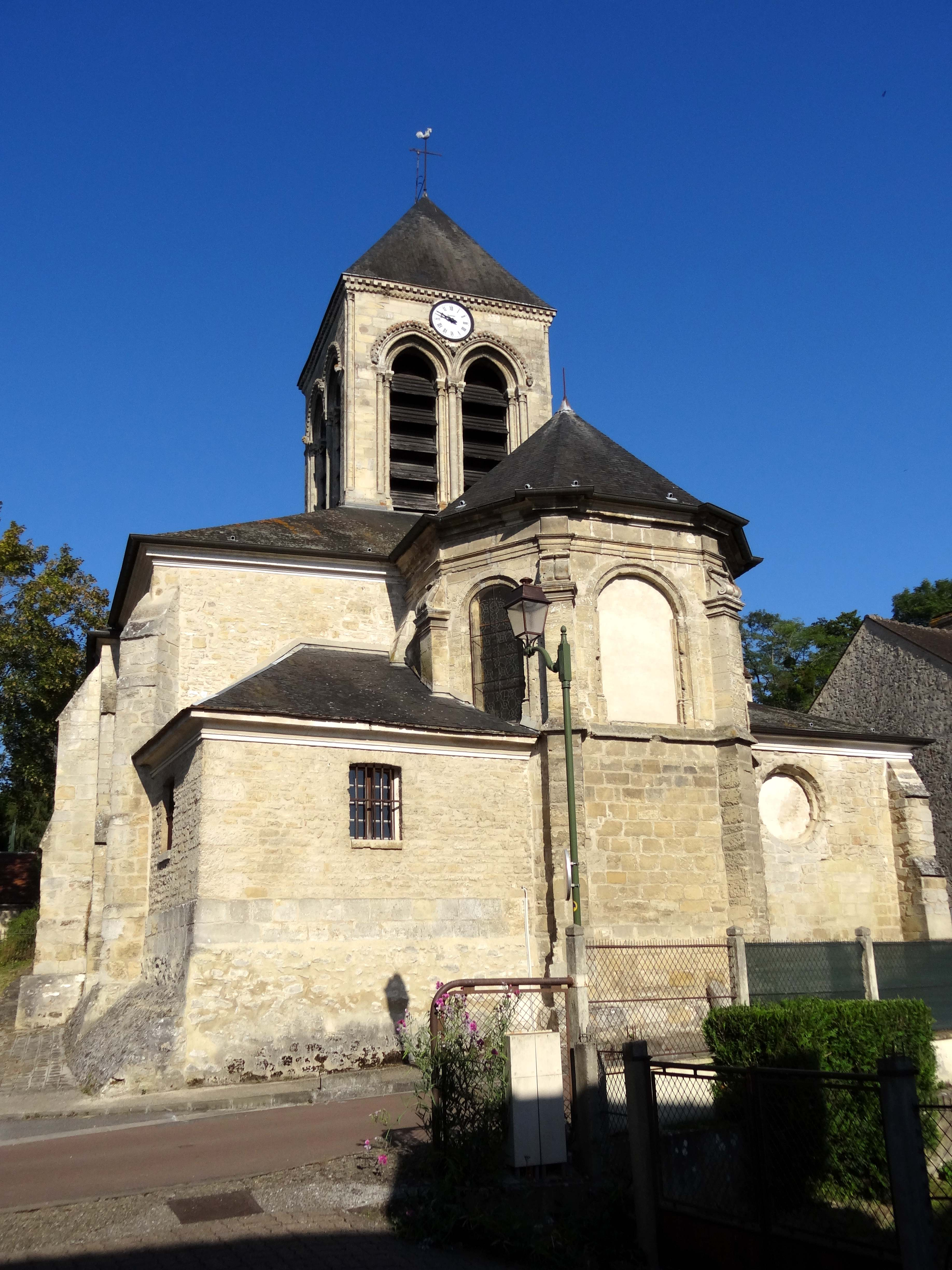 Église Saint-Séverin d'Oinville-sur-Montcient - voir titre.